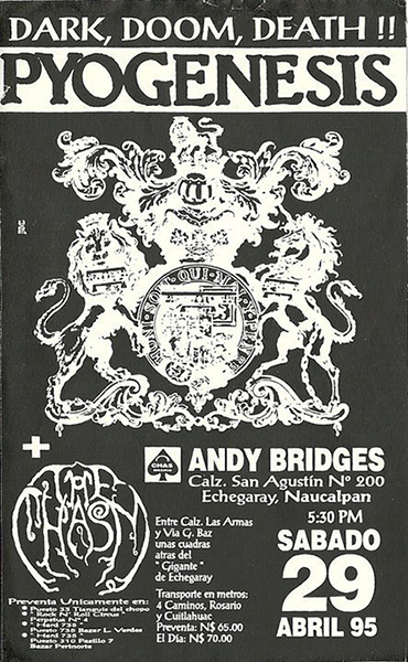 Poster zum Auftritt in Mexico City am 29.04.1995